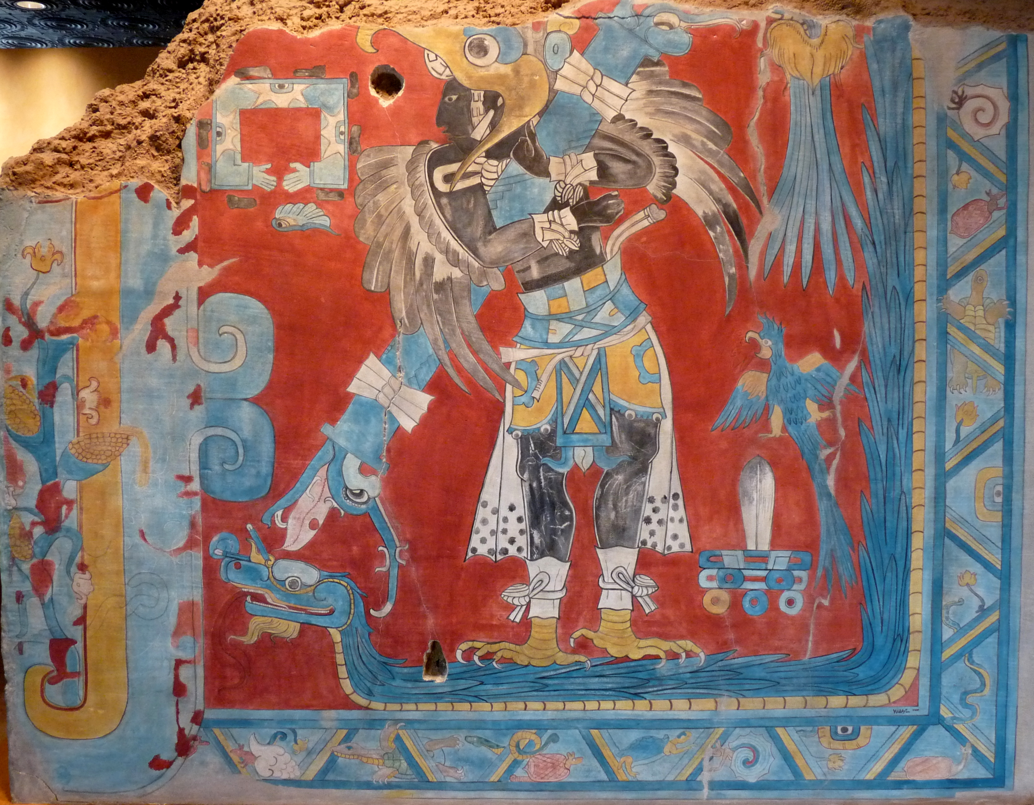 Reconstitución de una pintura mural de Cacaxtla, en el Museo Nacional de Antropología (Distrito Federal de México).